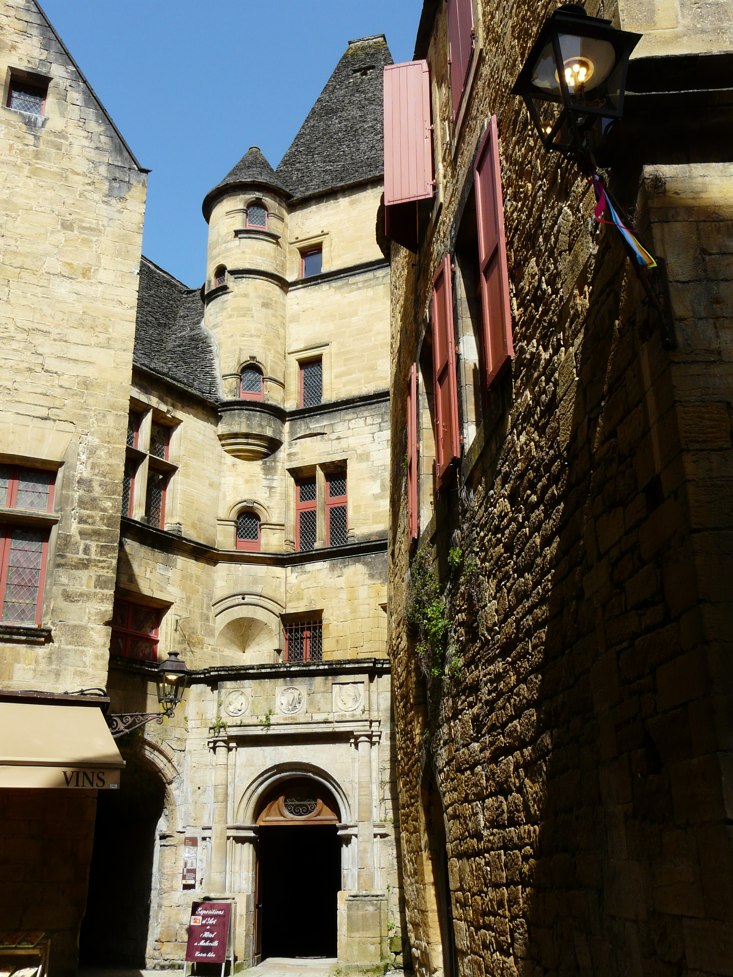 L'hôtel de Vienne (ou hôtel de Maleville), Sarlat-la-Canéda, Dordogne, France.